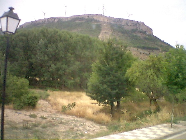 Carcelén Alb